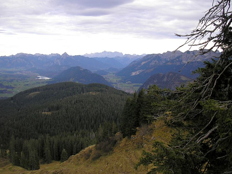 Ammergauer Alpen, Wetterstein und Tannheimer Gebirge (Bayern/Tirol). Blick vom Edelsberg bei Nesselwang, Allgäu. Eigene Aufnahme, Okt. 2006 / Ammergau Alps, Wetterstein and Tannheim Mountains (Bavaria, Tyrol) seen from Mount Edelsberg near Nesselwang (Allgäu, Germany). Own photo, Oct. 2006